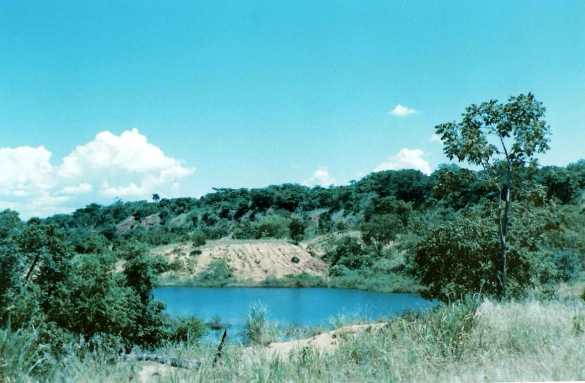 Descrição: A Cascalheira, em Três Lagoas, Mato Grosso do Sul, Brasil. 2007.